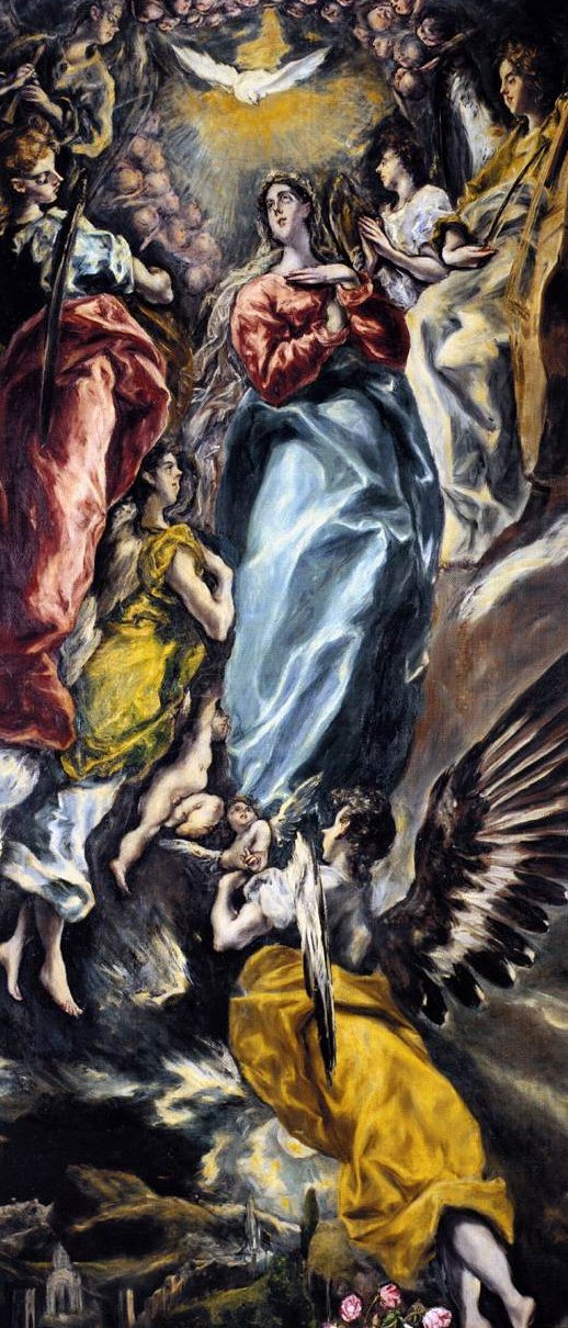 La obra representa la Inmaculada Concepción de la Virgen María.